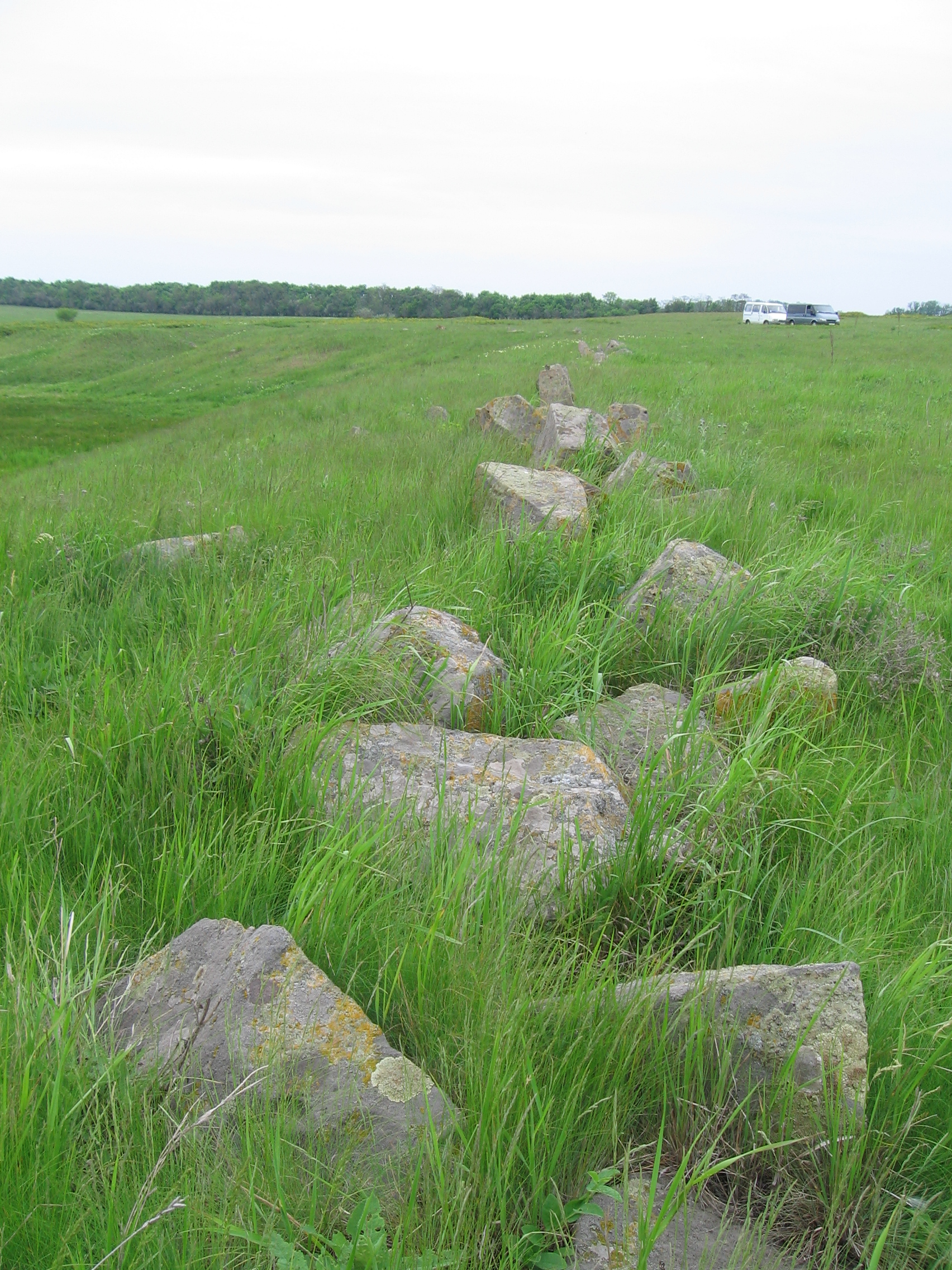 Фото